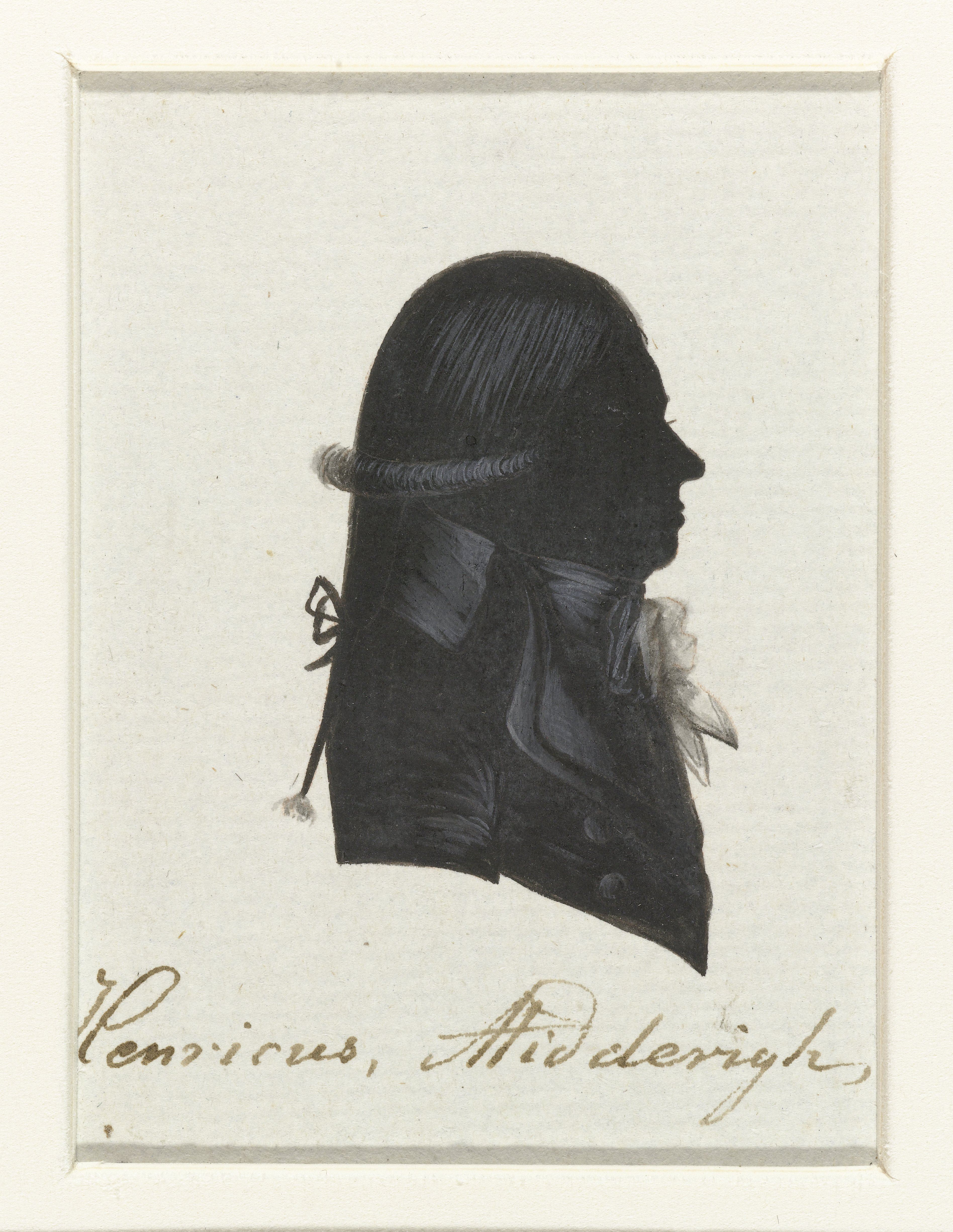 J.H. Midderigh. Tekening in Oost-Indische inkt, waarschijnlijk gemaakt door Hausdorff. De tekening behoort tot een serie van portretten van afgevaardigden naar de Eerste Nationale Vergadering in 1796-1797. Van de serie werden gravures gemaakt die zijn afgedrukt in "Geschiedenis der staatsregeling, voor het Bataafsche volk", een boek van Cornelius Rogge (1799).